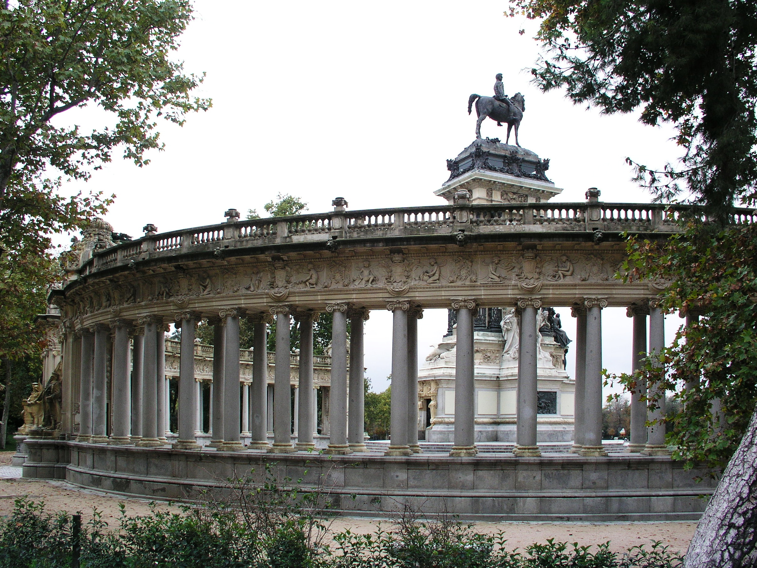 Jardines del Buen Retiro, Madrid, Spain. Monument to Alfonso XII.